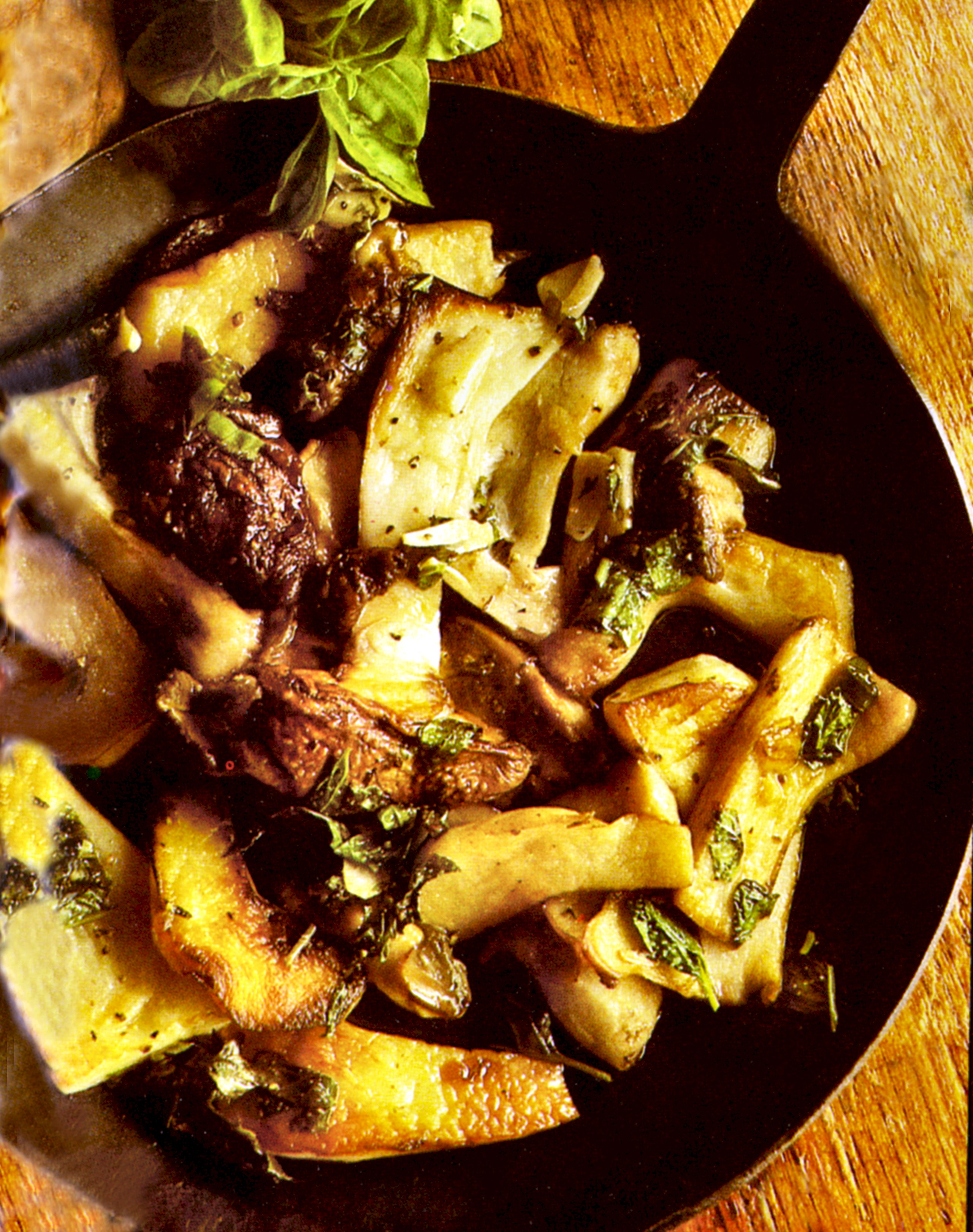 Mâncare de burete domnesc (Amanita caesarea)